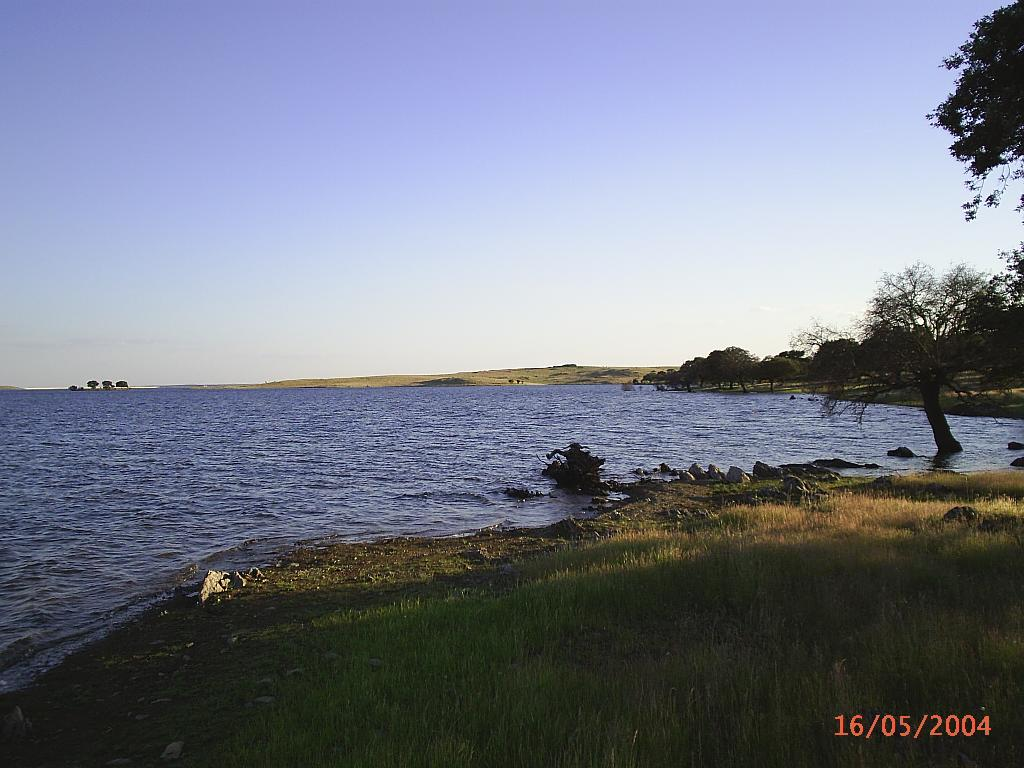 Embalse de Sierra Brava